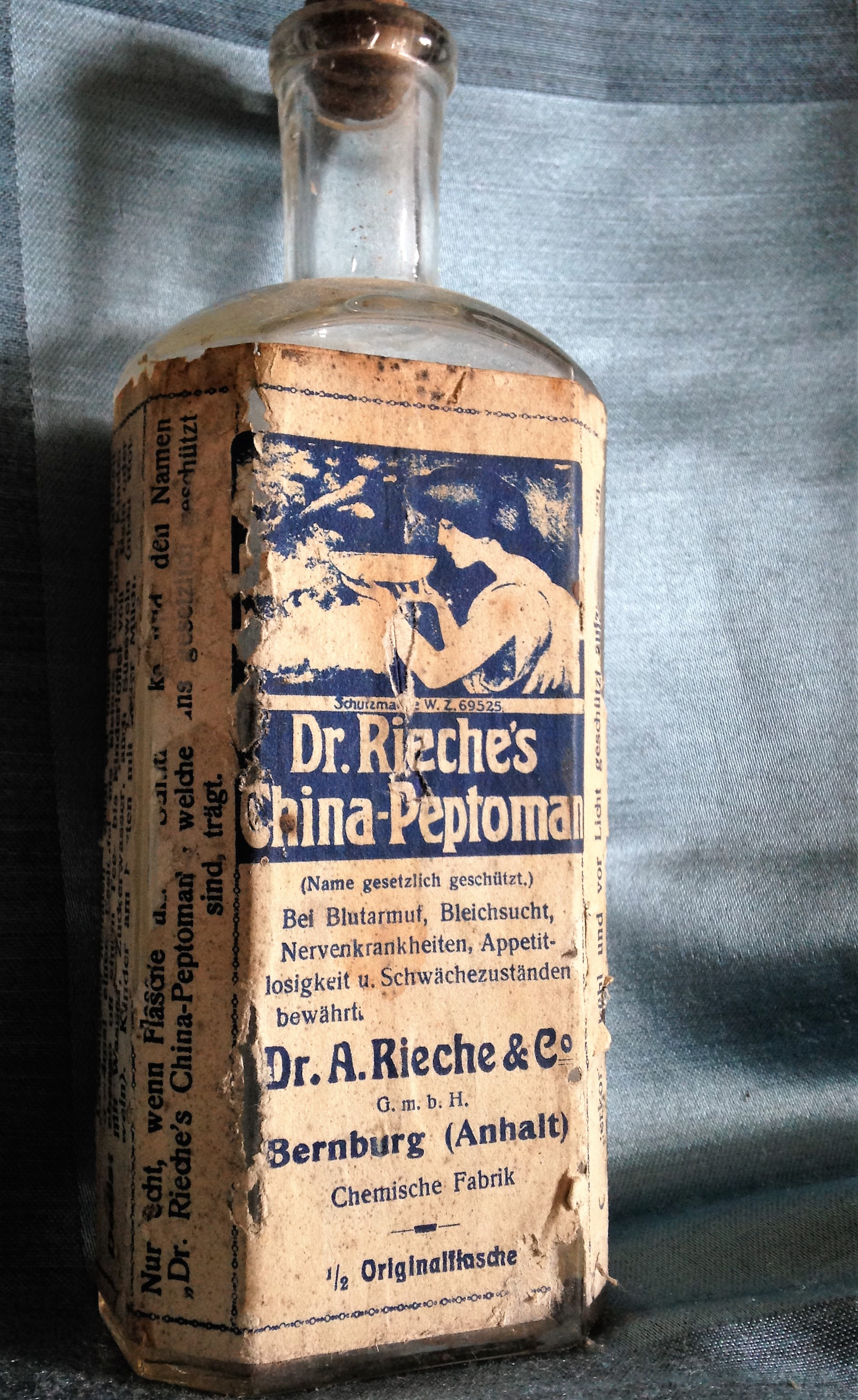 Dr. Rieche's China-Peptoman (Flasche, Seite 1), historisch ca. 1910 bis 1919